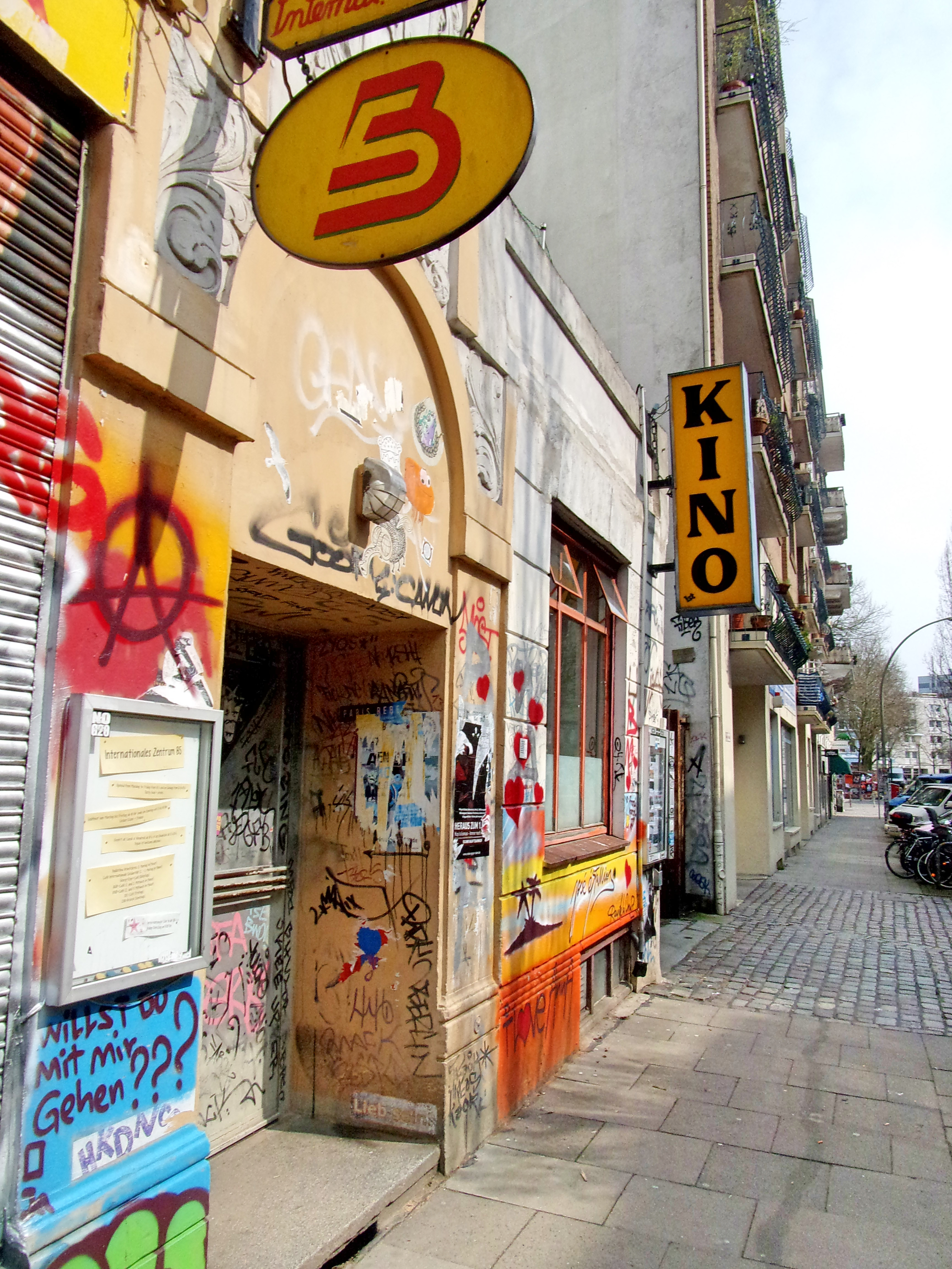 Das Kino B-Movie befindet sich in der Brigittenstraße 5 in Hamburg-St. Pauli auf dem Hof. Das kleine Kino ist ehrenamtlich organisiert und wird betrieben vom Verein B-Movie e. V. Kulturinitiative. Ansicht an der Brigittenstraße 5. Mehr zum Kino und dem gezeigten Programm unter folgendem Link